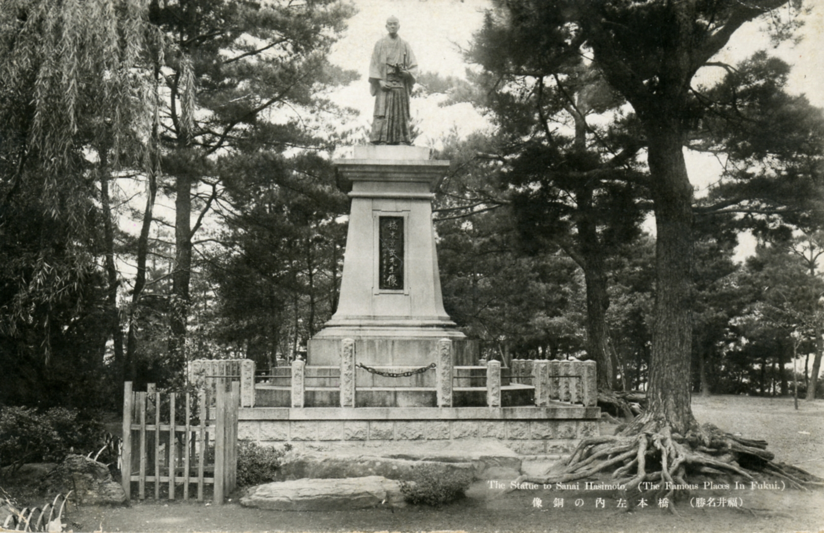 戦前の絵葉書。足羽山に建立された橋本左内の銅像。戦時中の1944年（昭和19年）に金属供出で供出された。